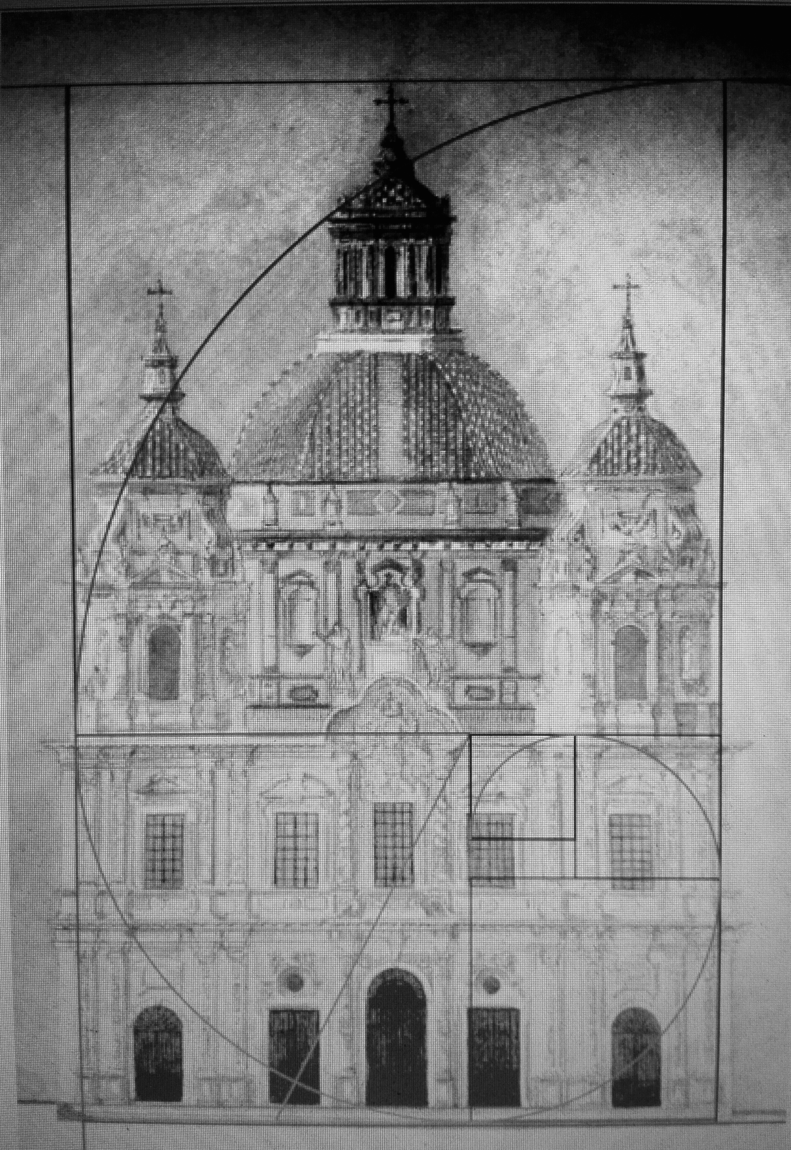 espiral